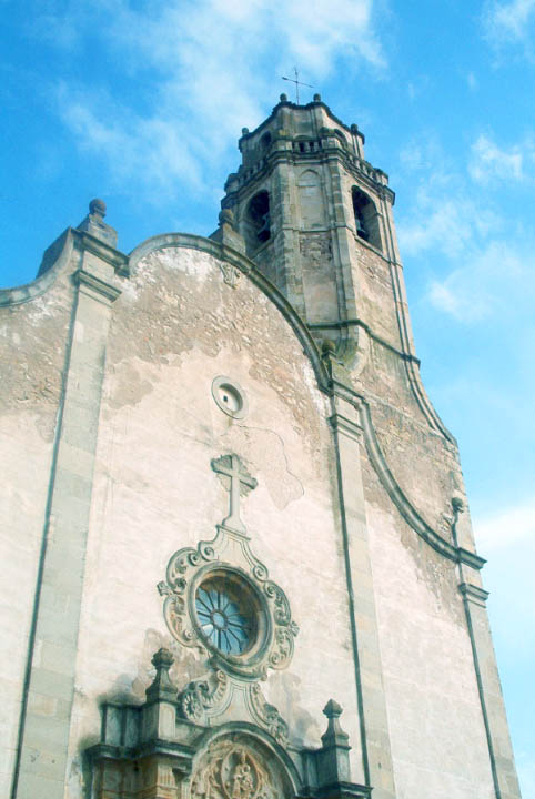 Església de Barberà de la Conca